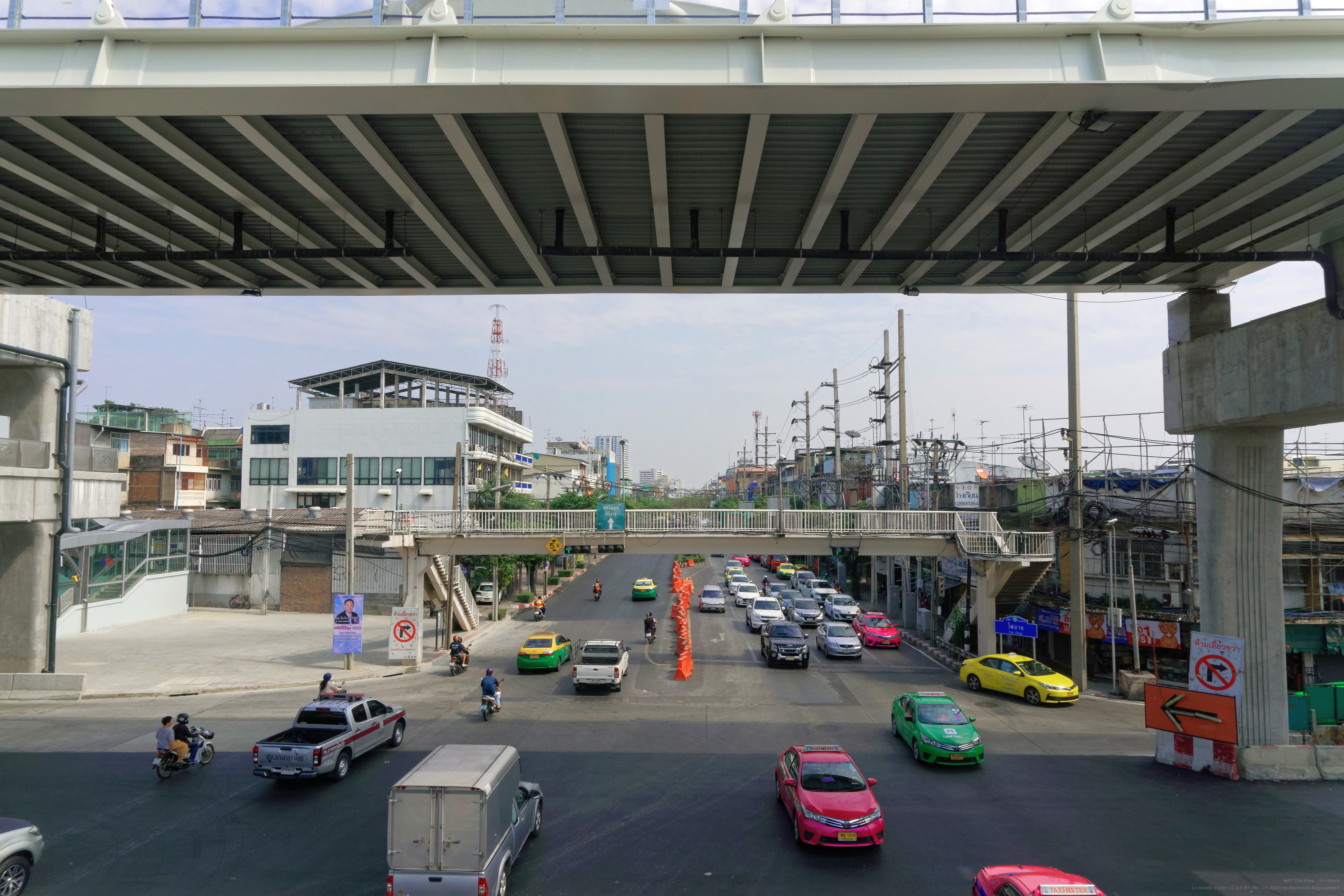 MRT Fai Chai – Fai Chai junction